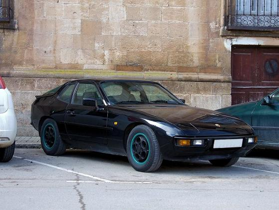 Porsche 924 Spirit